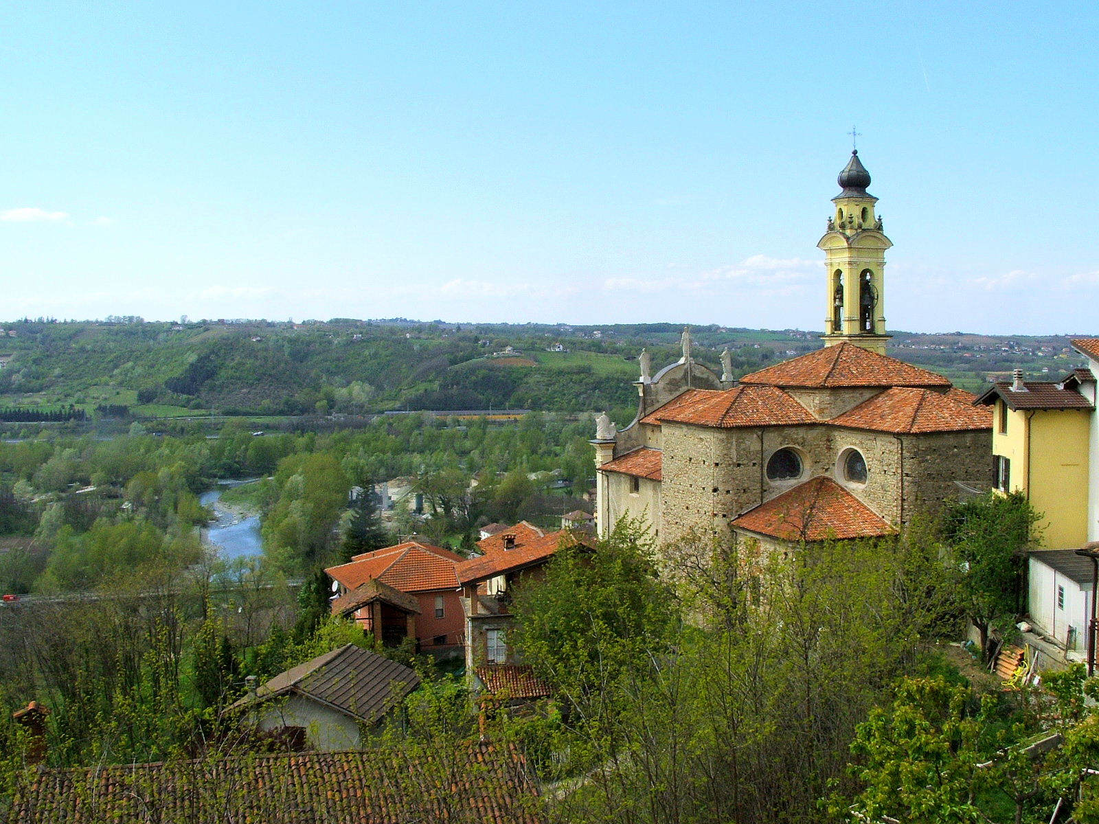 Silvano d'Orba, Alessandria, Piemonte, Italia Parrocchiale di San Pietro